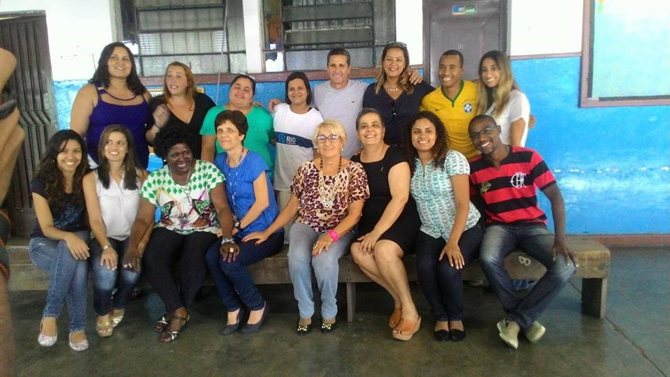 Visita do ex-aluno e ex-jogador da seleção, Jorginho.